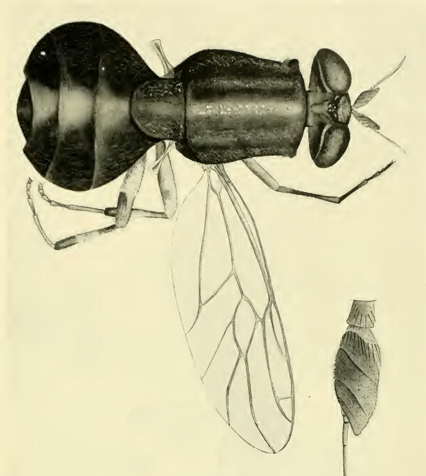 Dochmiocera aurilineata Hardy, 1922; dorsal view and antennae